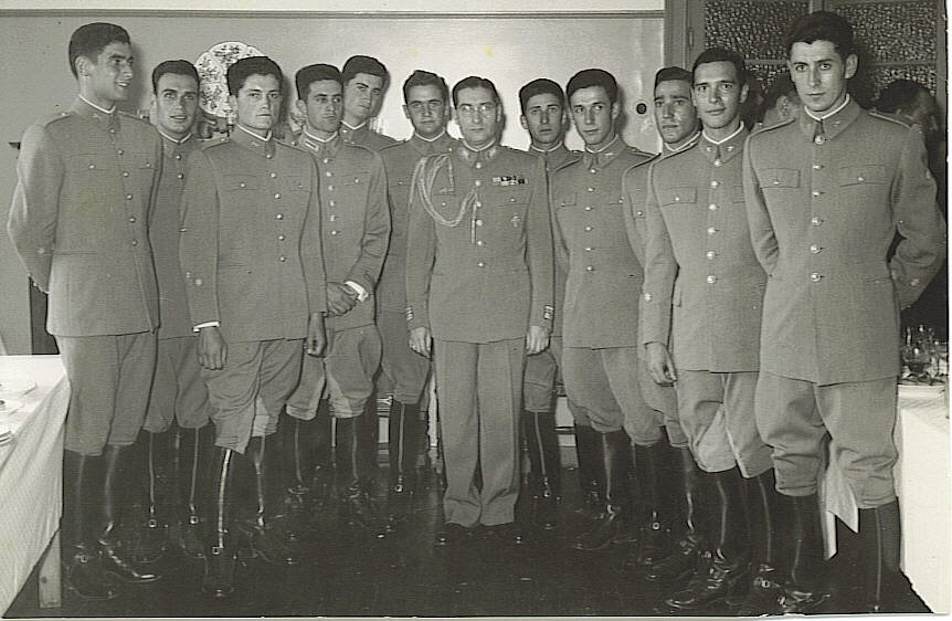 Academia Militar - Formatura 1955